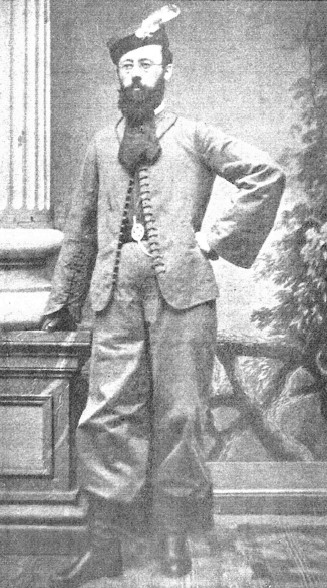 MUDr. Jan Štros (1830-1900), český lékař a politik